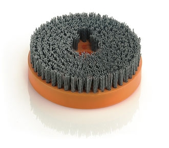 Tellerbürsten kommen als rotierendes Werkzeug in der Industrie zum Einsatz. Sie stehen mit einer Vielzahl von Kunststoff-, Metall- und Holzkörpern sowie den unterschiedlichsten Besatzmaterialien zur Verfügung.